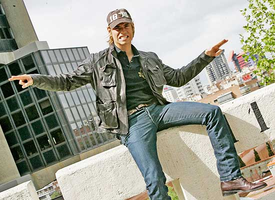 Carlos Baute, en una imagen de archivo.